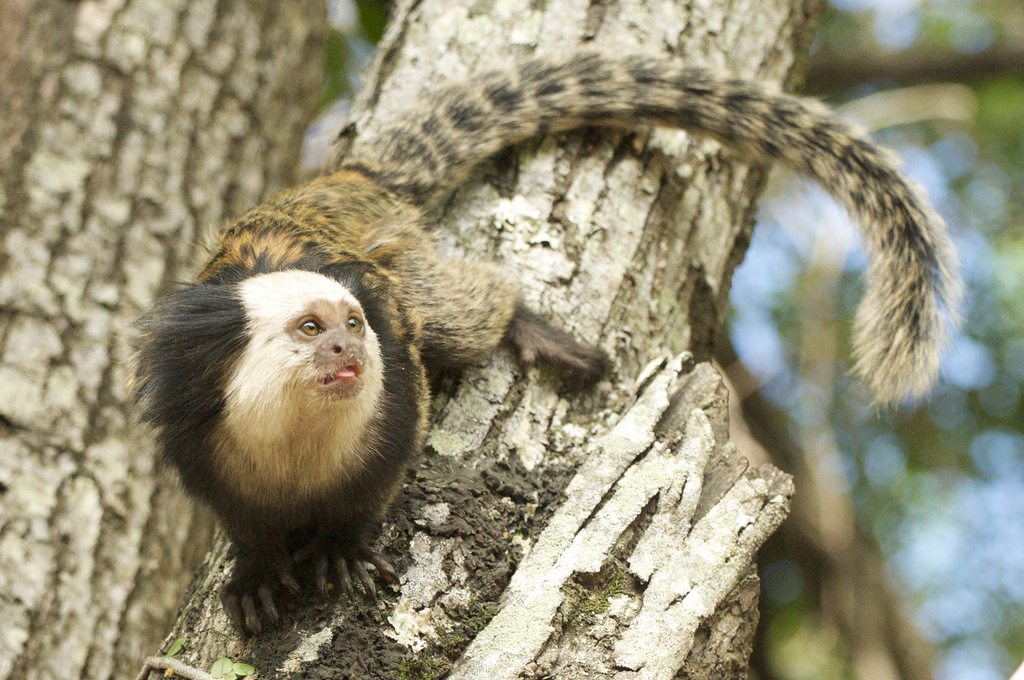 Sagüi-da-serra.